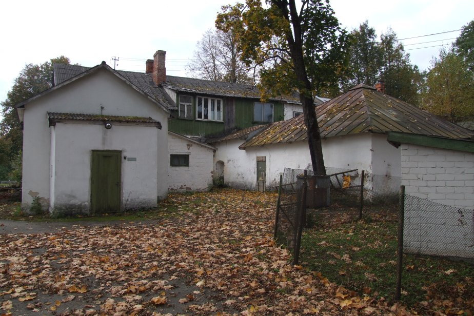 Bij. pienotava, 02.10.2010.